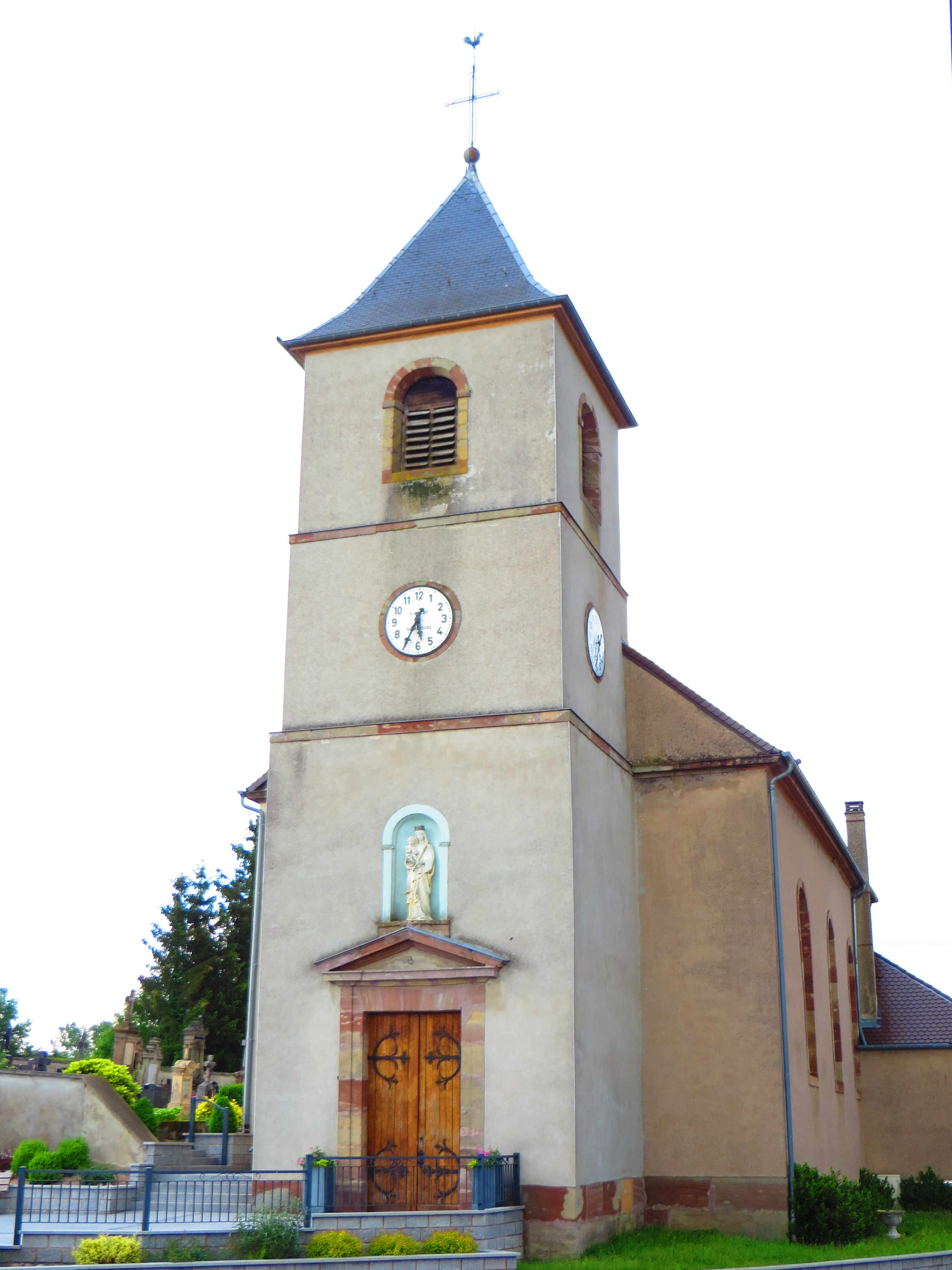 Ippling Église de la Visitation